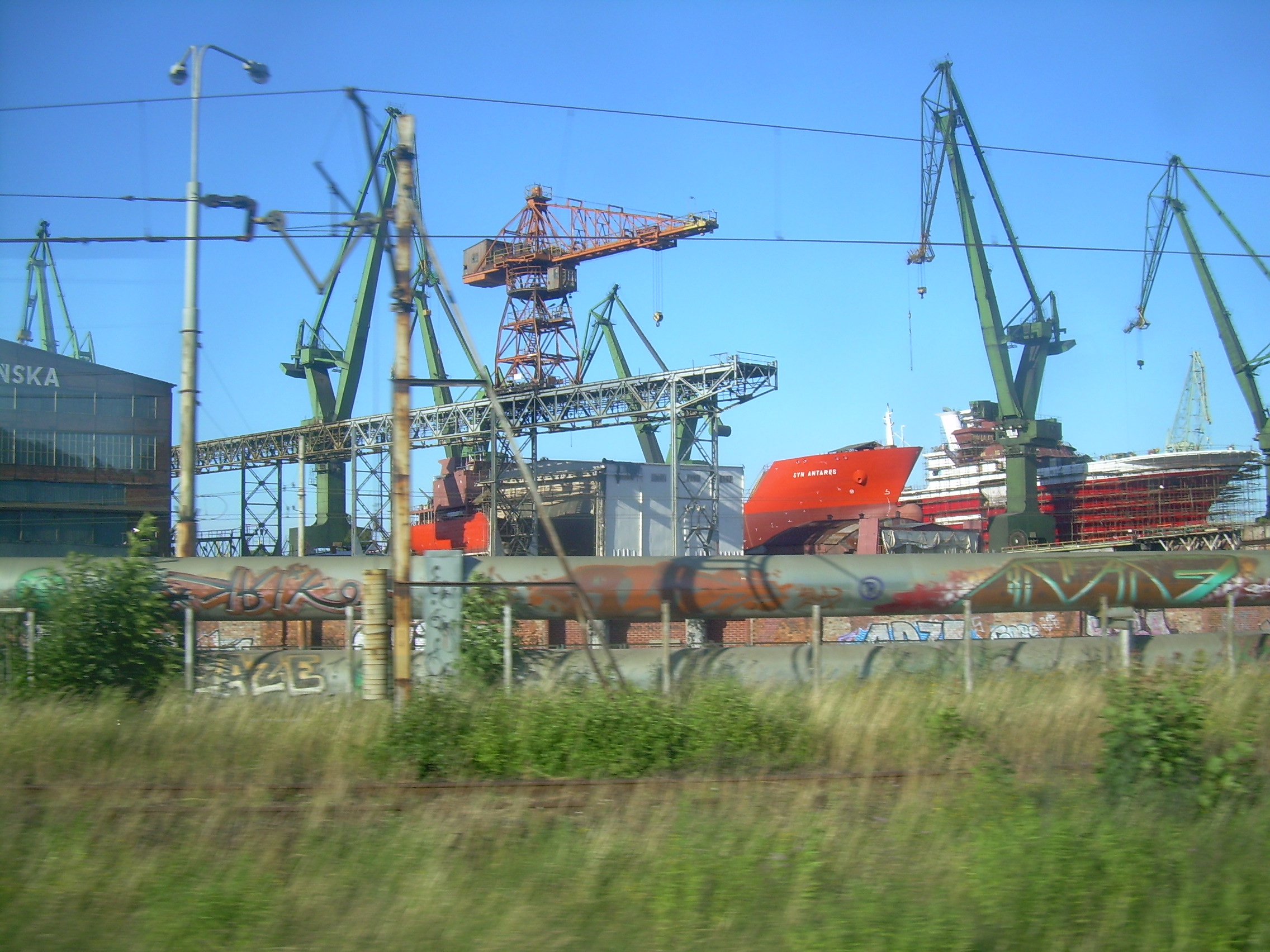 Gdańsk Shipyard.